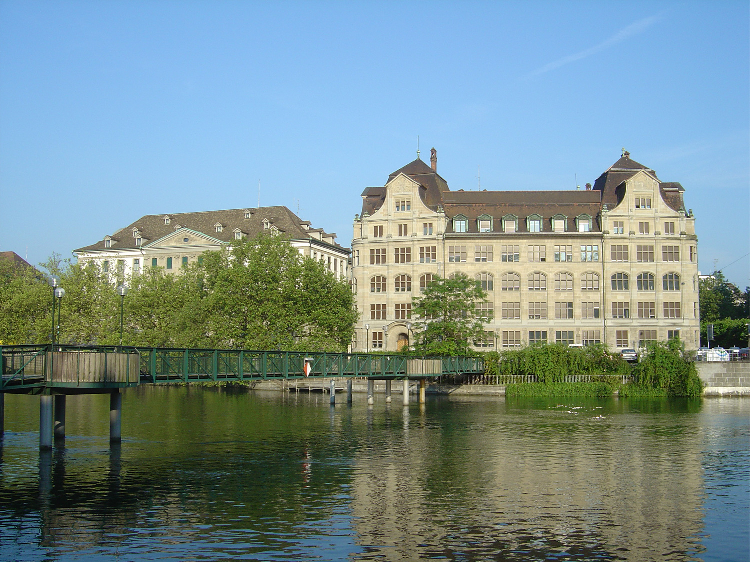 Amtshäuser I und II am Bahnhof-Quai in Zürich; im Vordergrund der Mühle-Steg